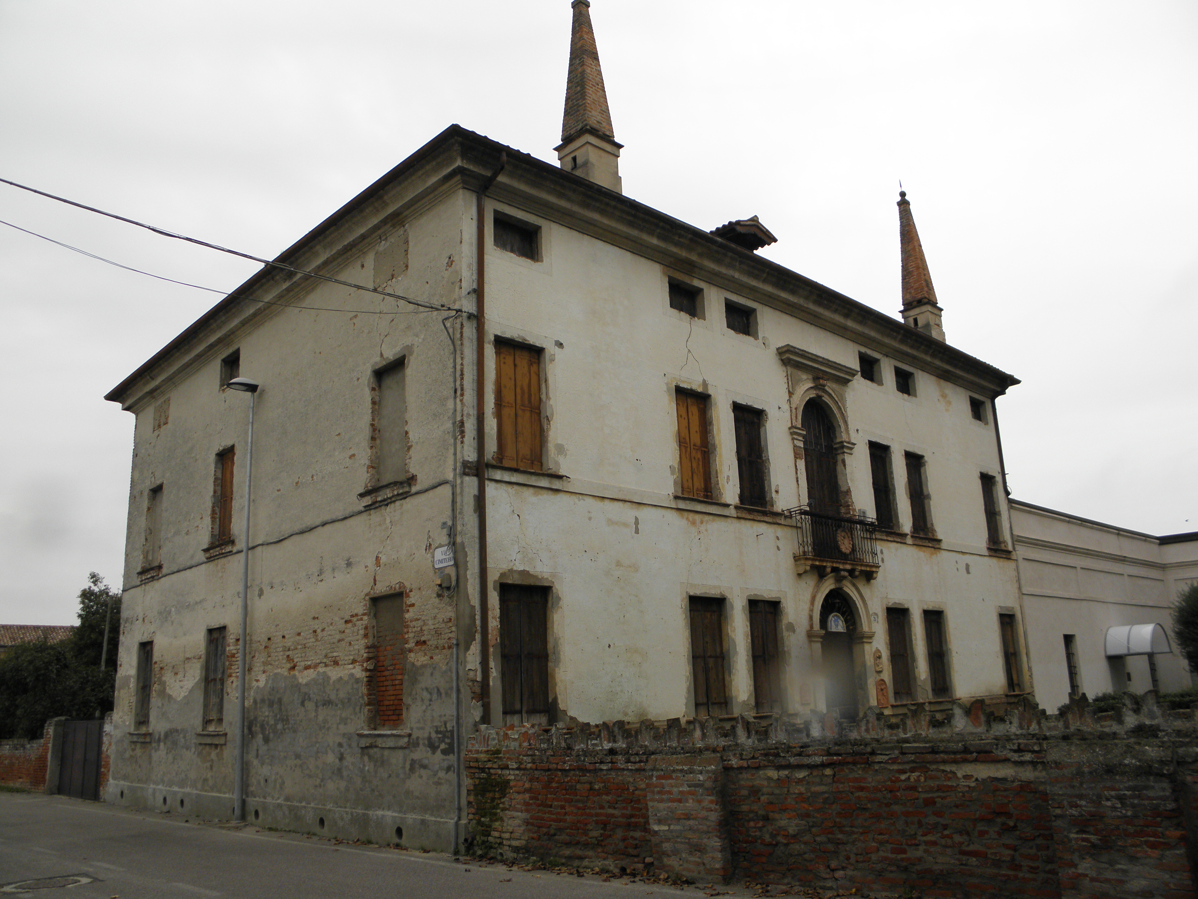 Fratta Polesine, la canonica posta nei pressi della chiesa parrocchiale dei Santi Pietro e Paolo.